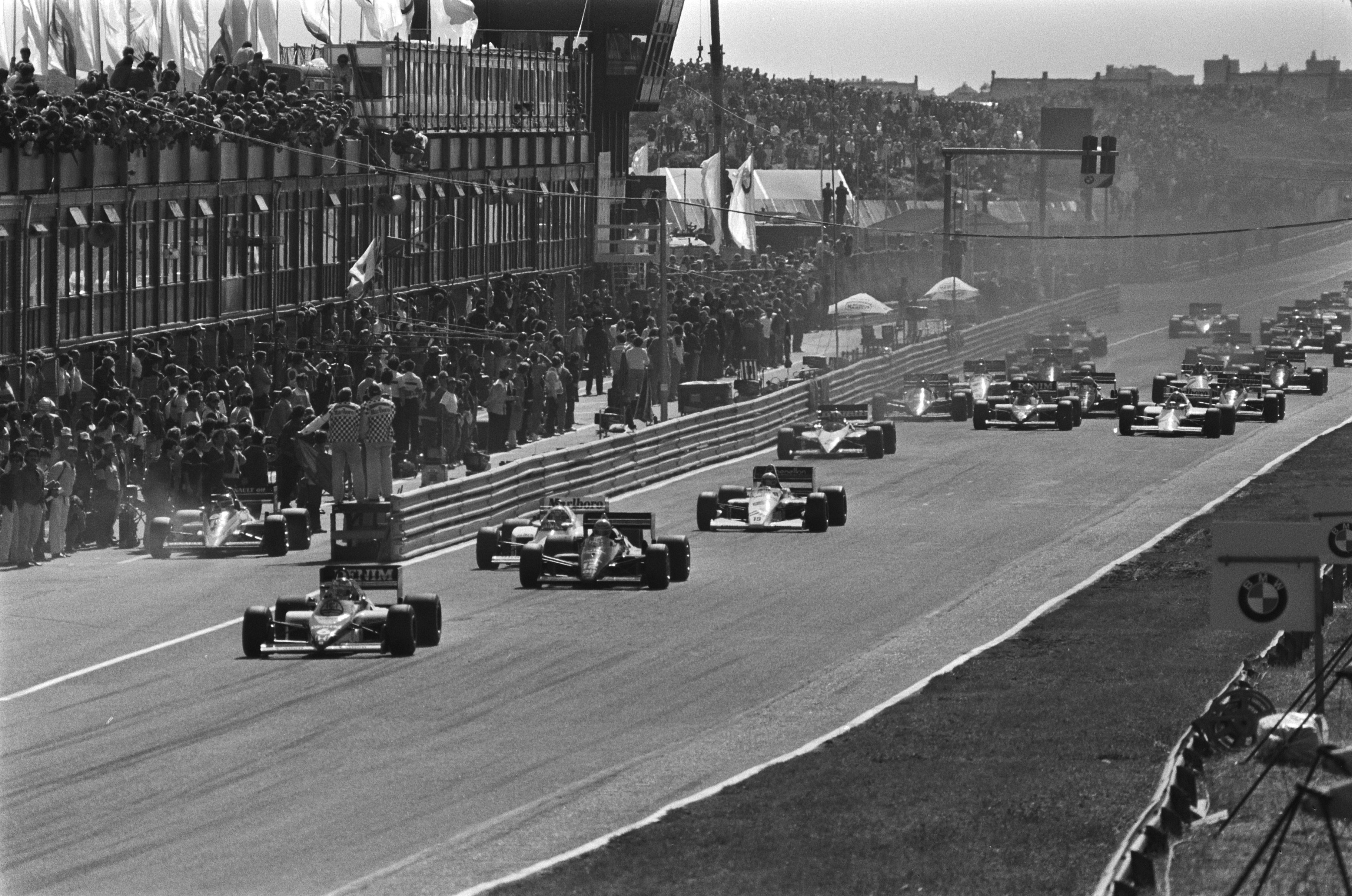 Grote Prijs van Nederland Formule I op Zandvoort; start.